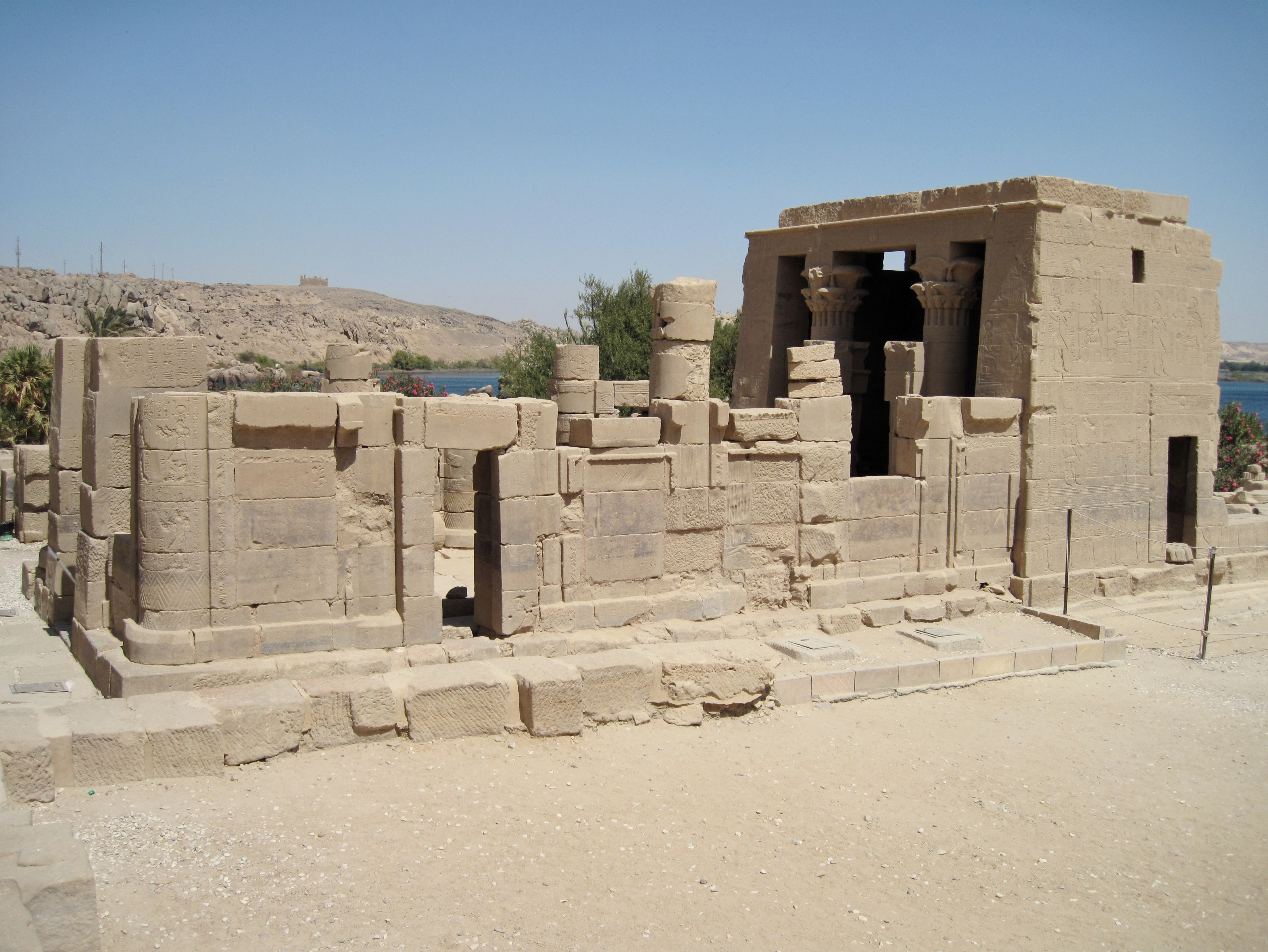 Kleiner Hathor-Tempel von Philae auf der Insel Agilkia, Ägypten